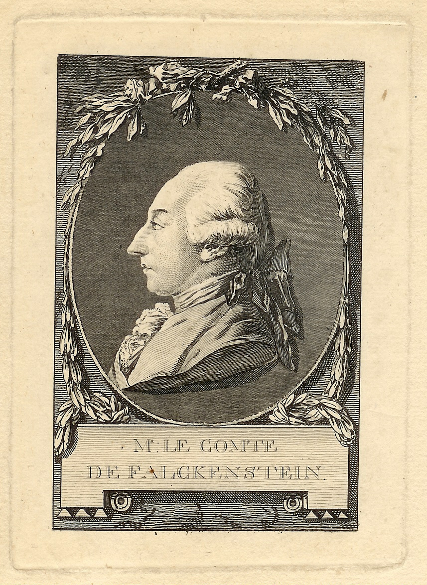 "M(onsieu)r le comte de Falckenstein" (Kaiser Joseph II., inkognito als Graf von Falkenstein)